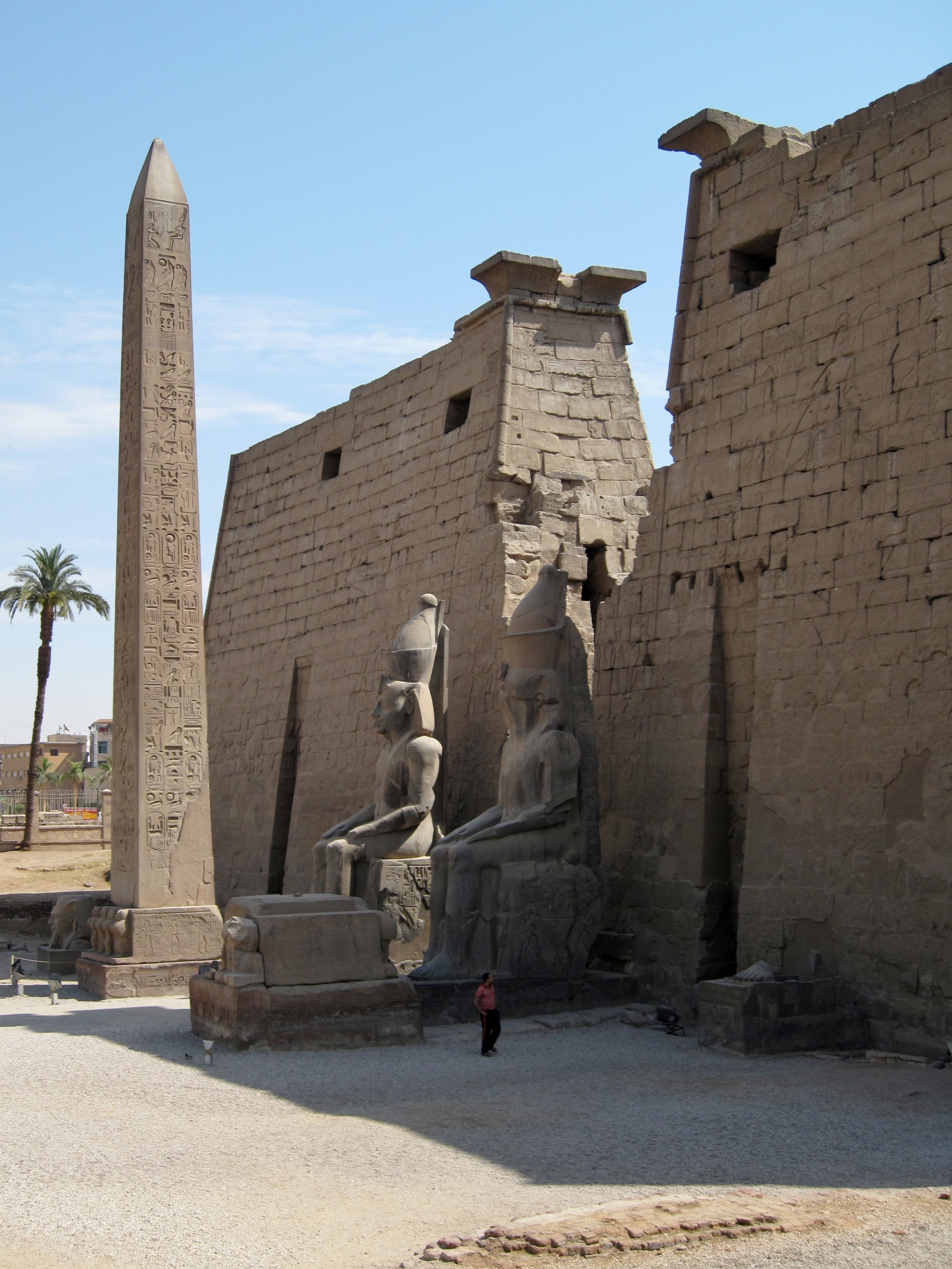 Eingangsbereich des Tempels von Luxor, Ägypten